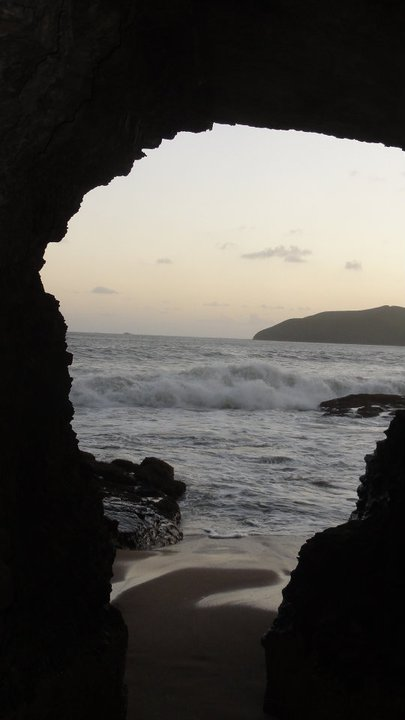 Tunnel reliant la Baie des tortues à la Roche Percée